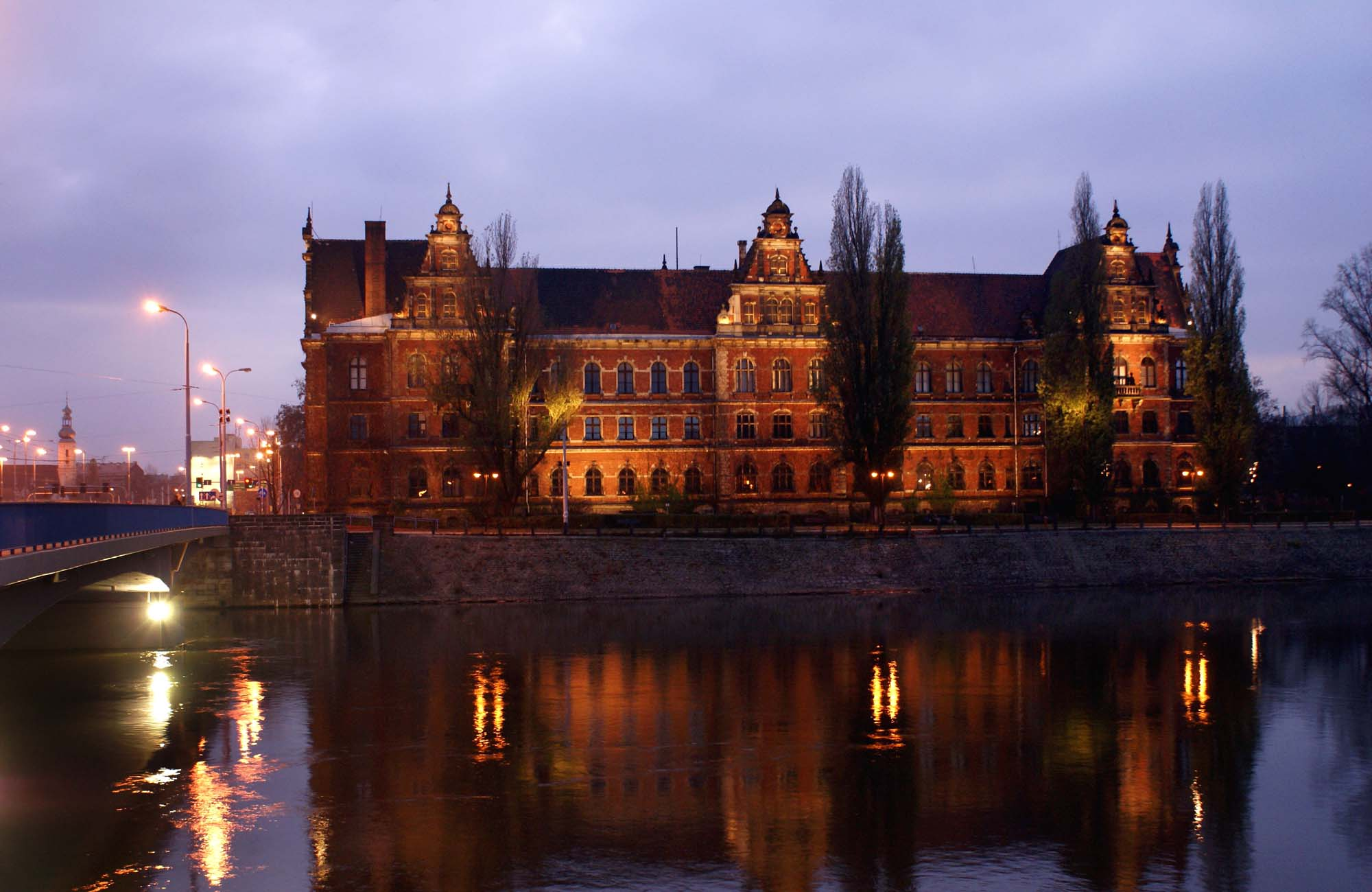 Wrocław Stare Miasto, pl. Powstańców Warszawy 5 - Muzeum Narodowe, dawny gmach Zarządu Prowincji (zabytek nr A/5258/325/Wm)